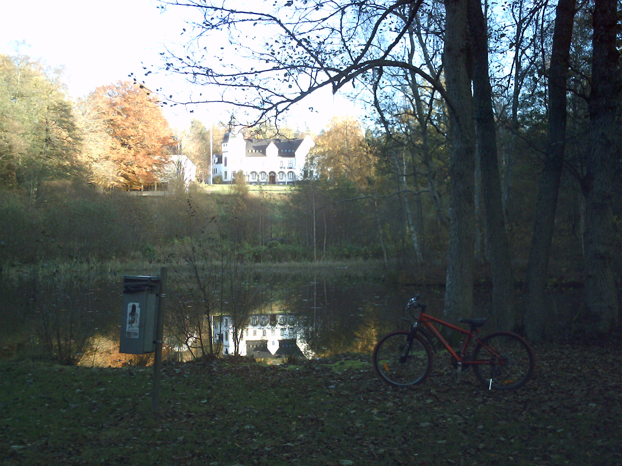 Hellidens slott speglas i parkens damm en solig höstdag. Tidaholm.